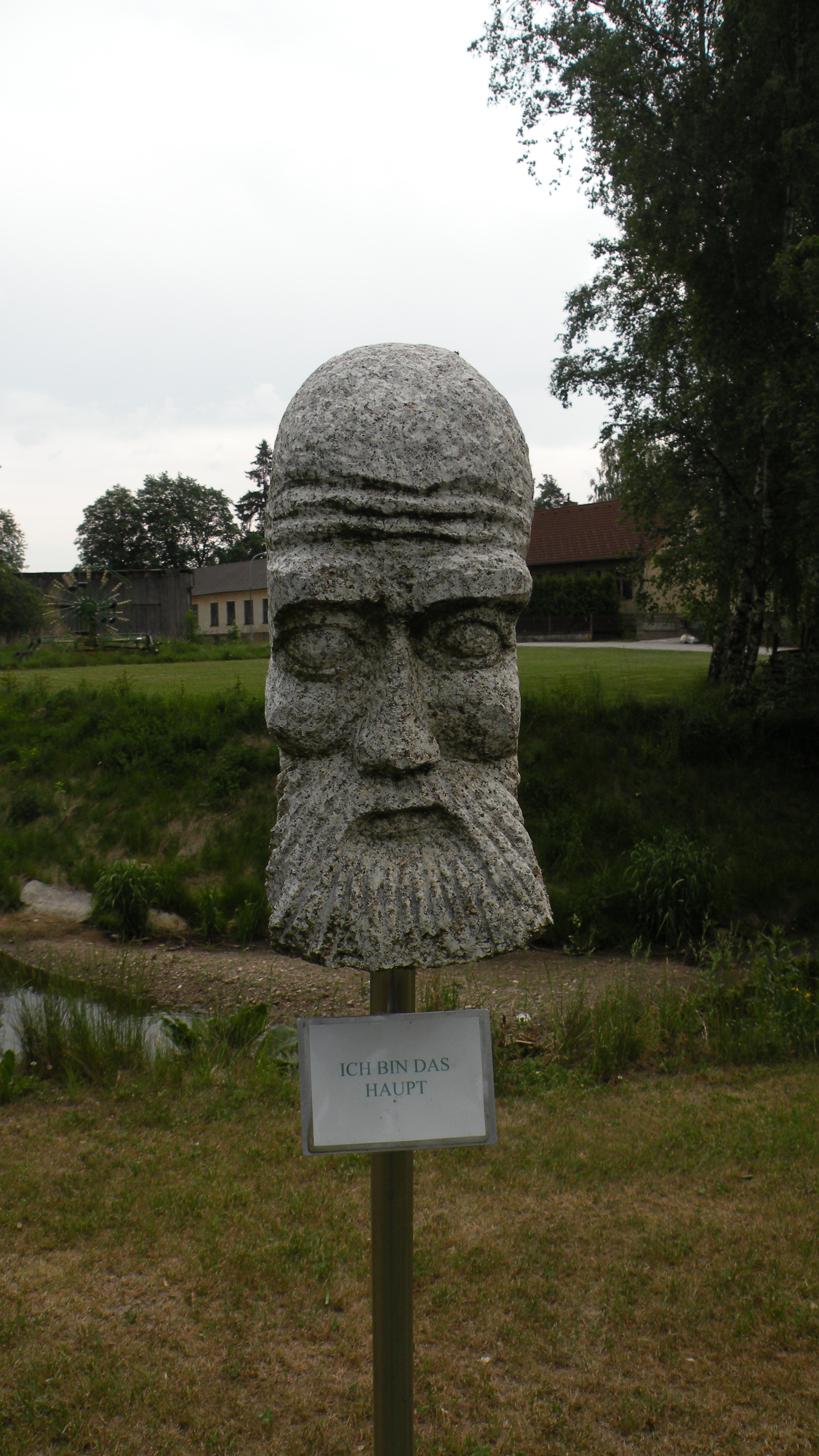 16 Skulpturen zum Thema Haupt bilden den "Hauptplatz", das ist ein Park in der Katastralgemeinde Kleinpertholz in der Stadtgemeinde Heidenreichstein